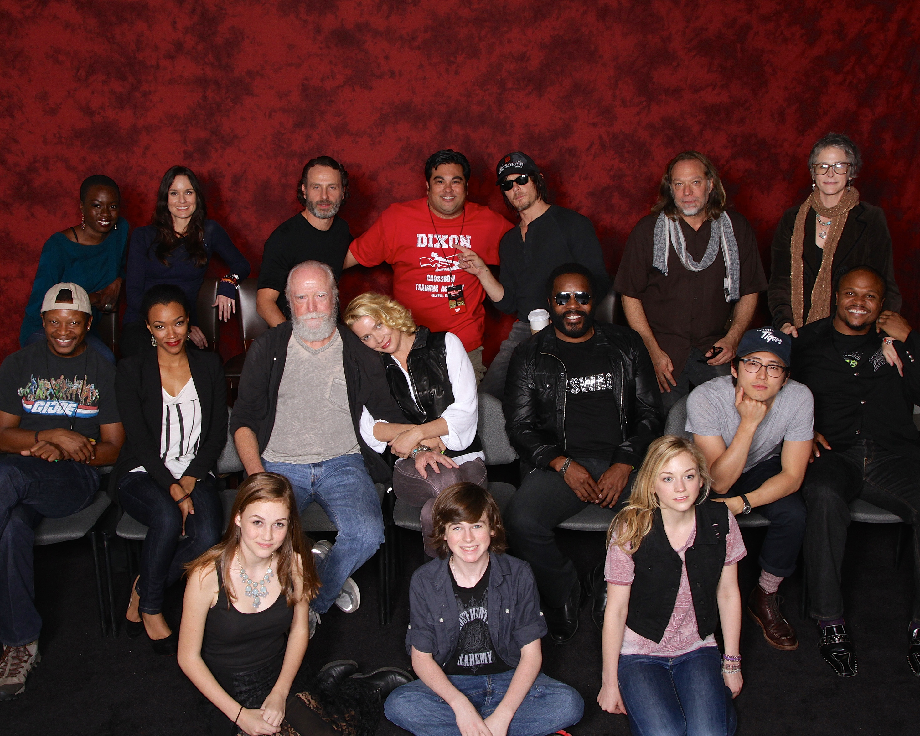 Walker Stalker Con 2013